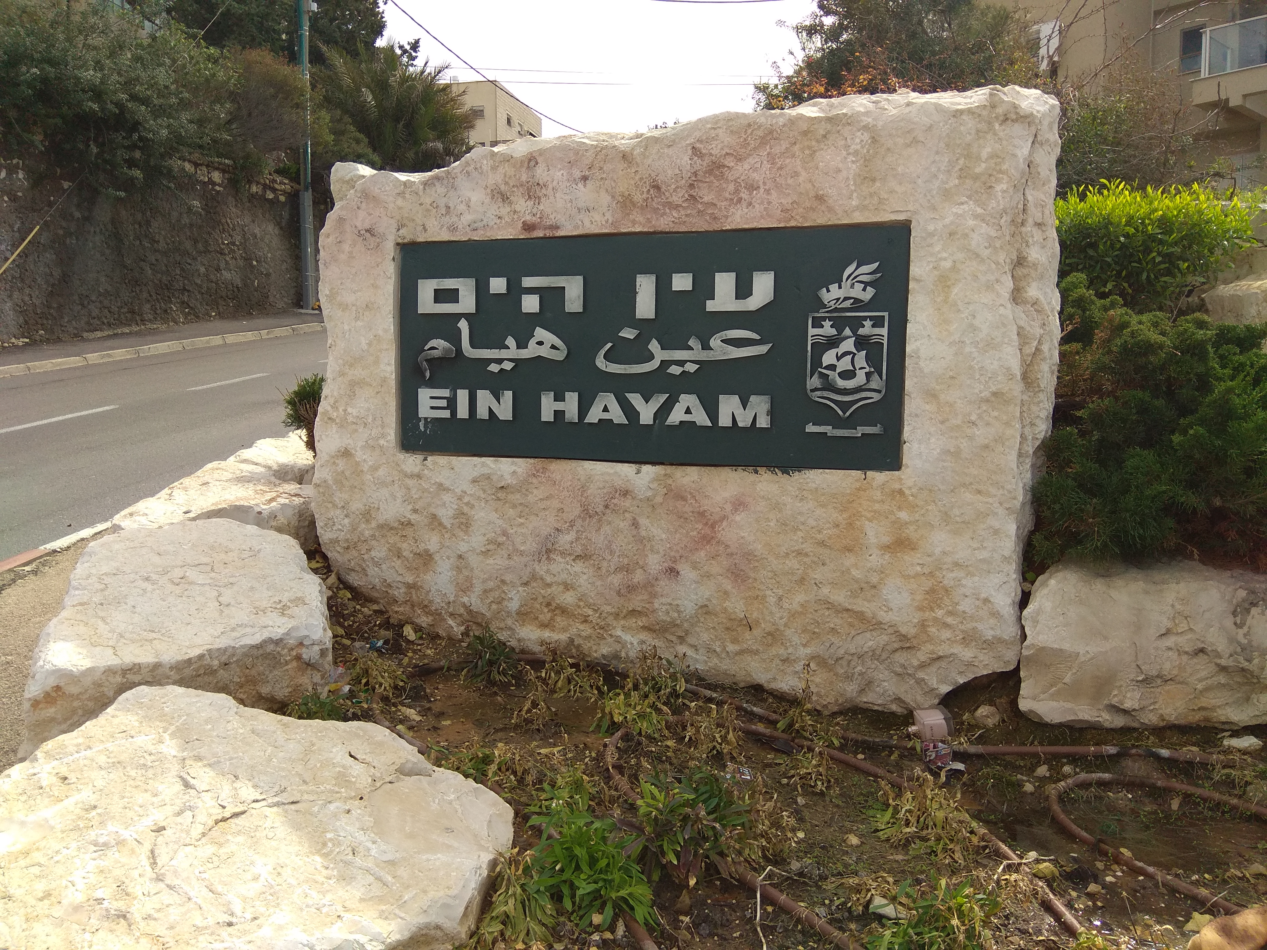 שלט בכניסה לשכונת עין הים